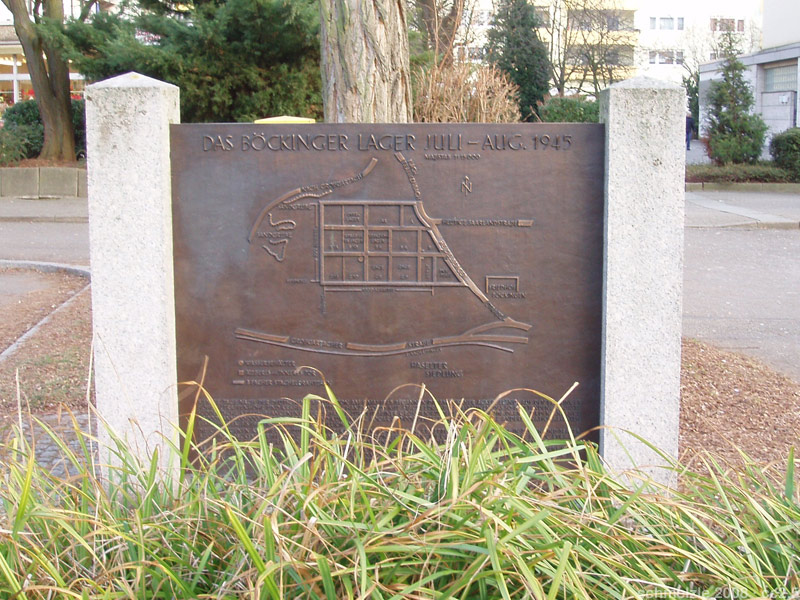 Gedenktafel an das „Lager Böckingen“ (PWE 10) am Kraichgauplatz in Heilbronn-Böckingen